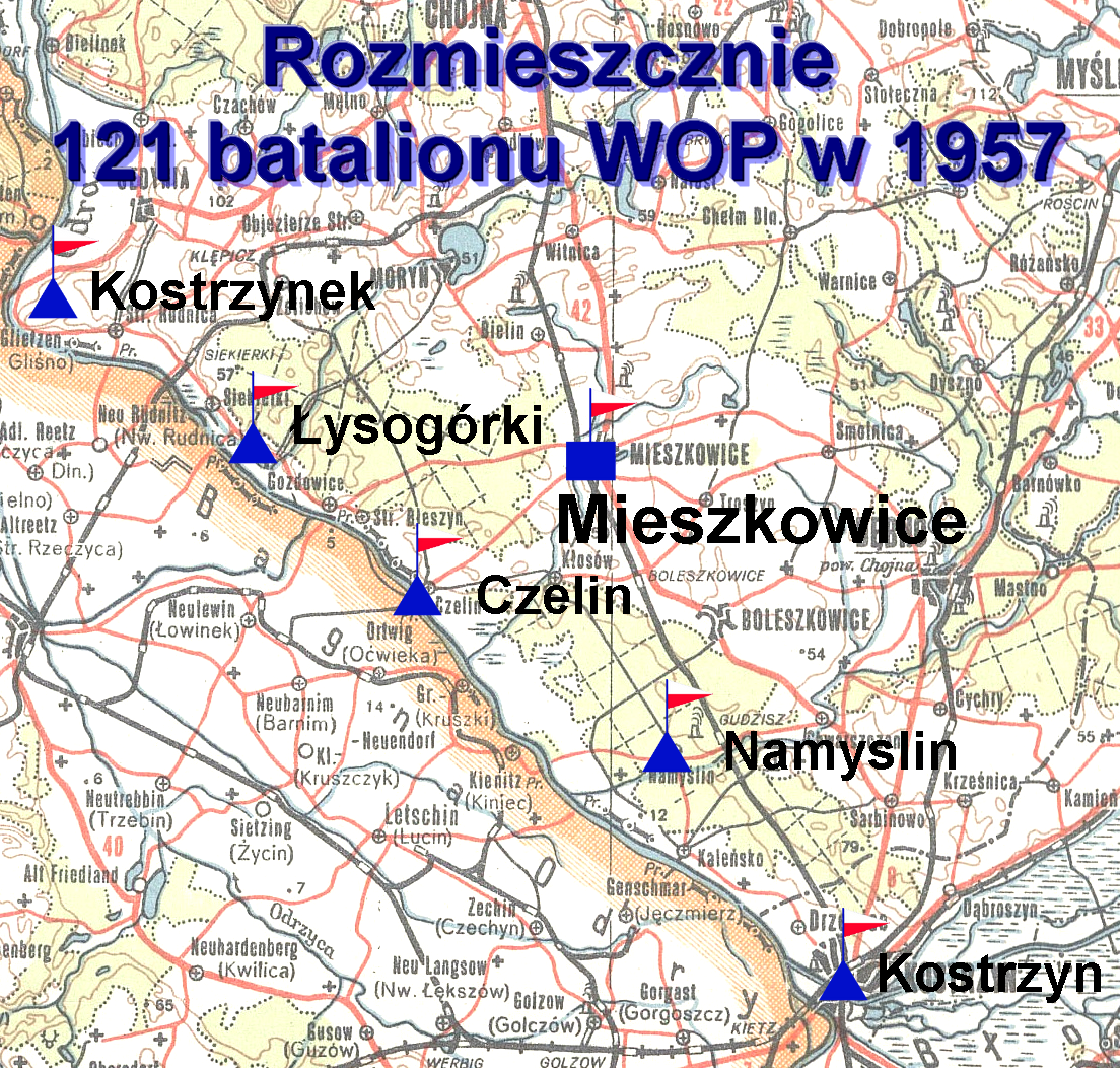 Rozmieszczenie 121 batalionu WOP w 1957